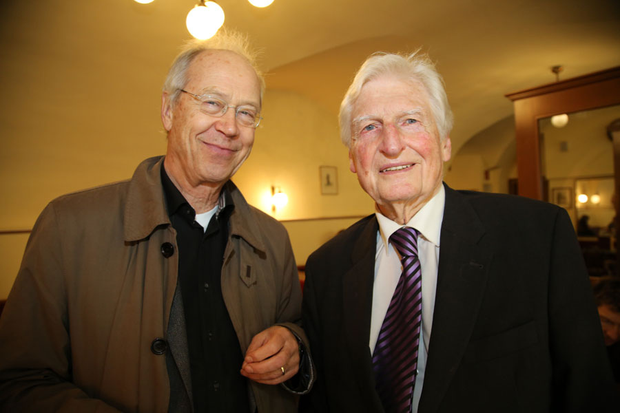 Politiker und Autor Peter Marboe, Botschafter Wolfgang Wolte